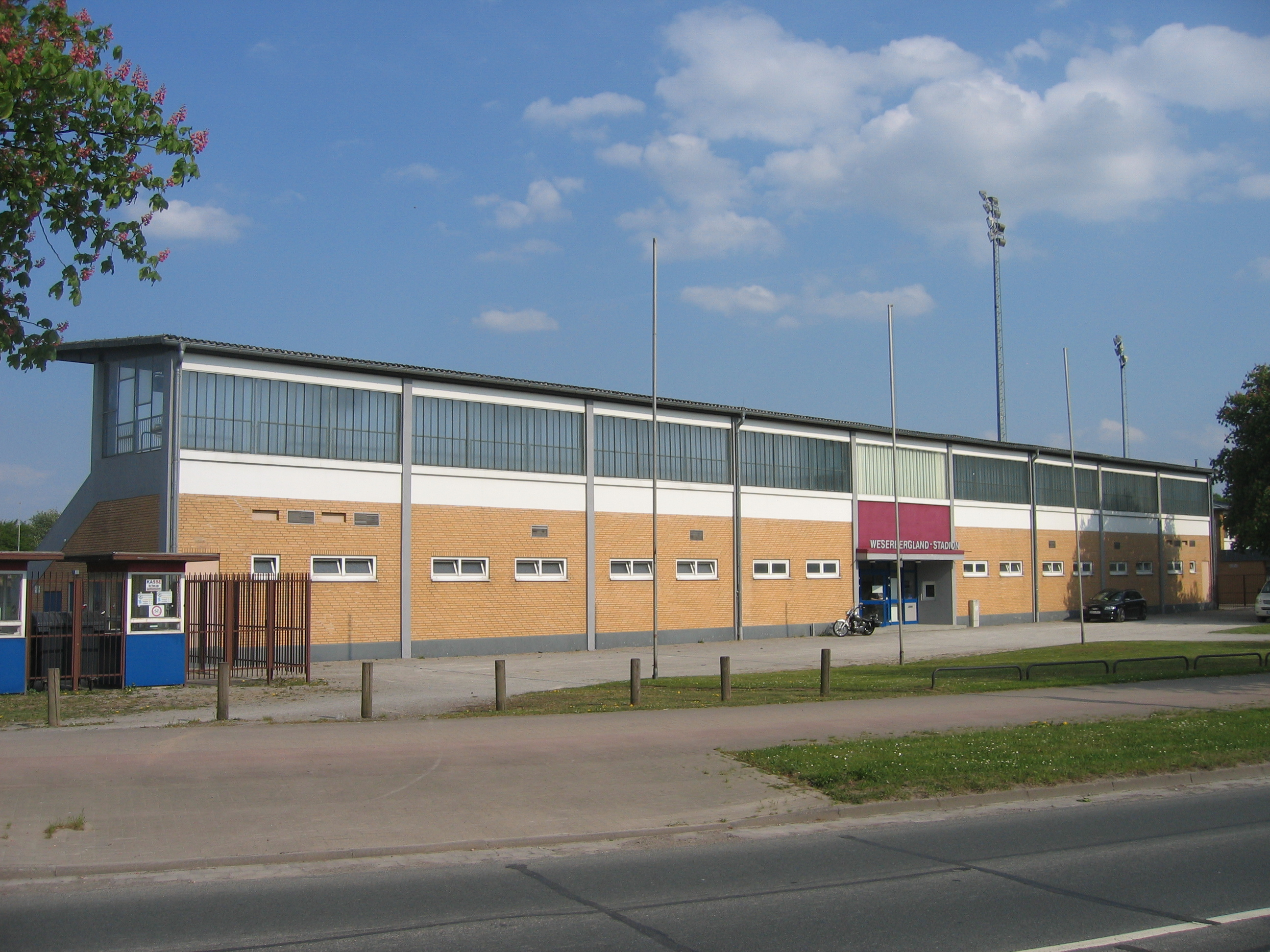 Tribünen des Weserberglandstadions in Hameln